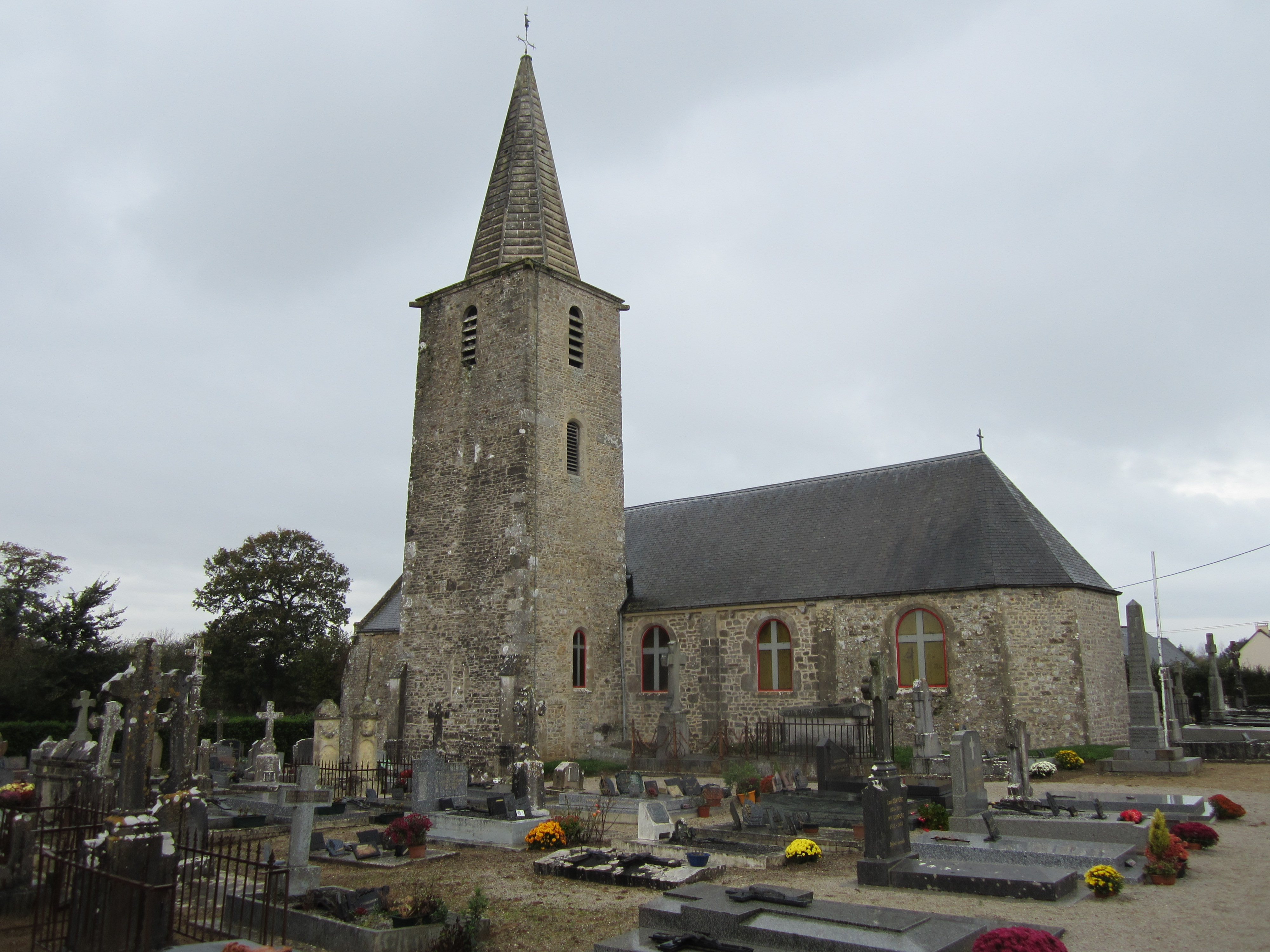 Église Notre-Dame d'Éroudeville